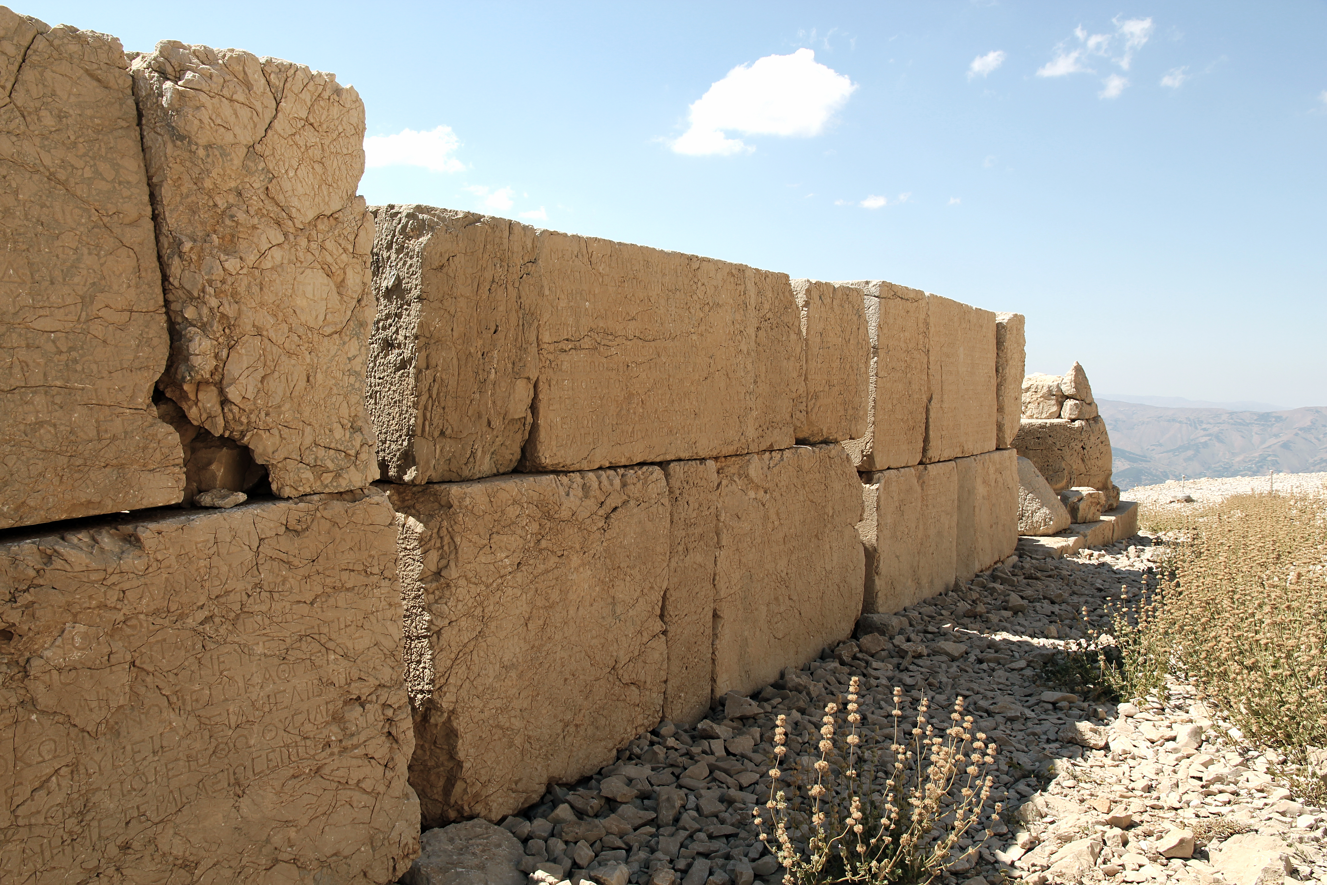 Rückseite der Monumentalstatuen mit Nomos-Inschrift, Nemrut Dağı, Südosttürkei, Westterrasse